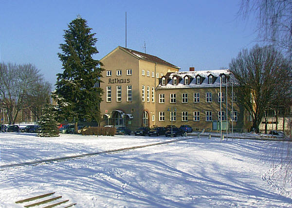 Rathaus Hohen Neuendorf, Deutschland. 1935-1936 erbaut nach Plänen von Architekt Wilhelm Büning (1881-1957).